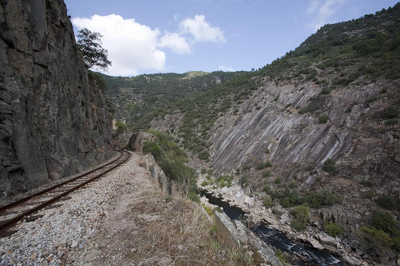 Linha ferroviária do Tua. Carrazeda de Ansiães, Bragança, Portugal.